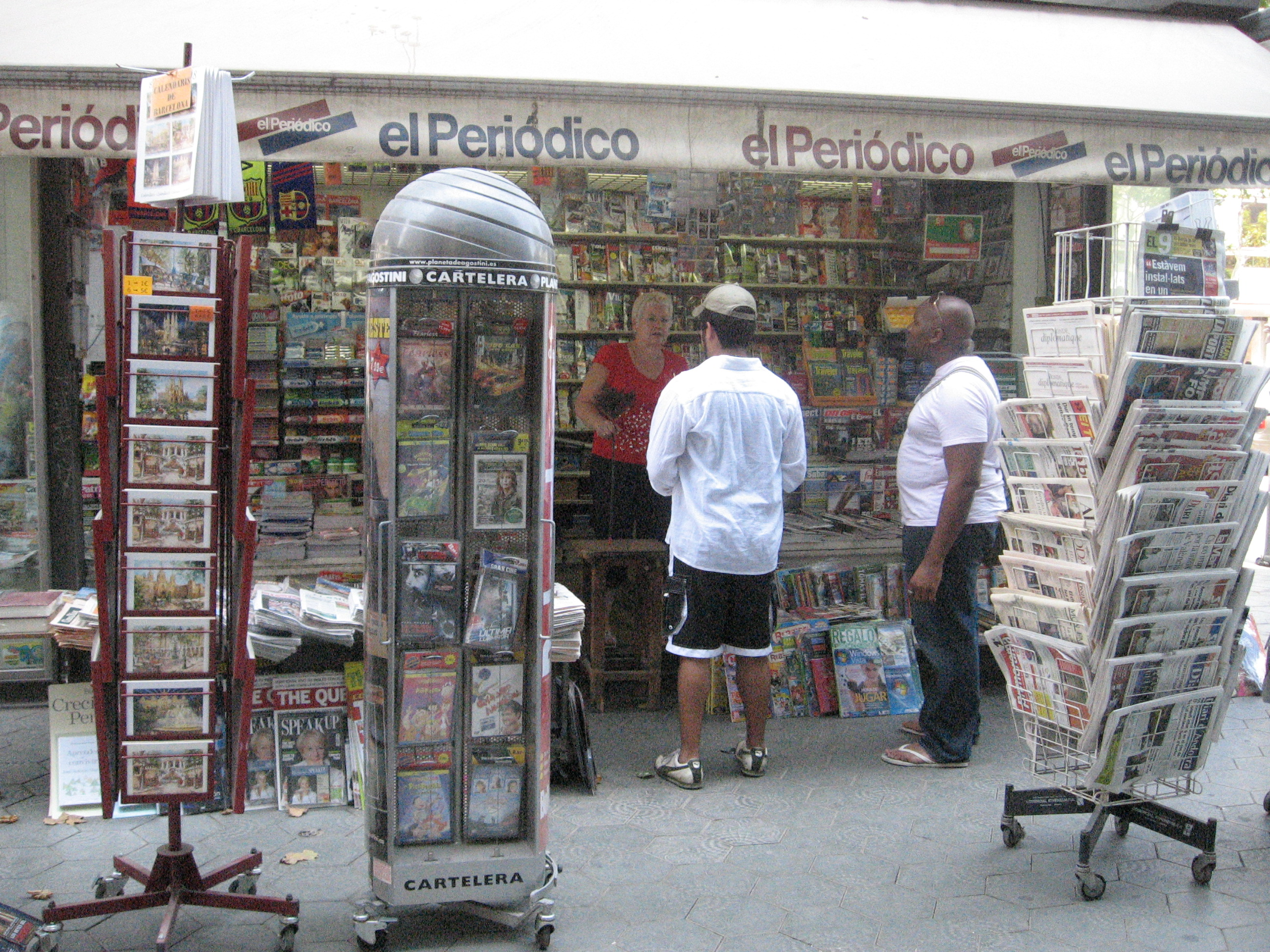 Barcelona - newspapers kiosk